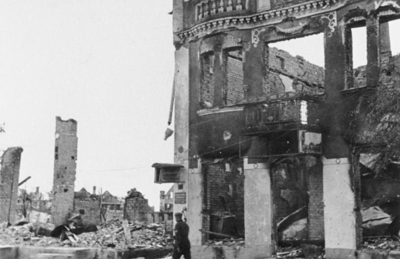 Litauen - Tauroggen Zerstörte Gebäude in Tauroggen 28.6.1941